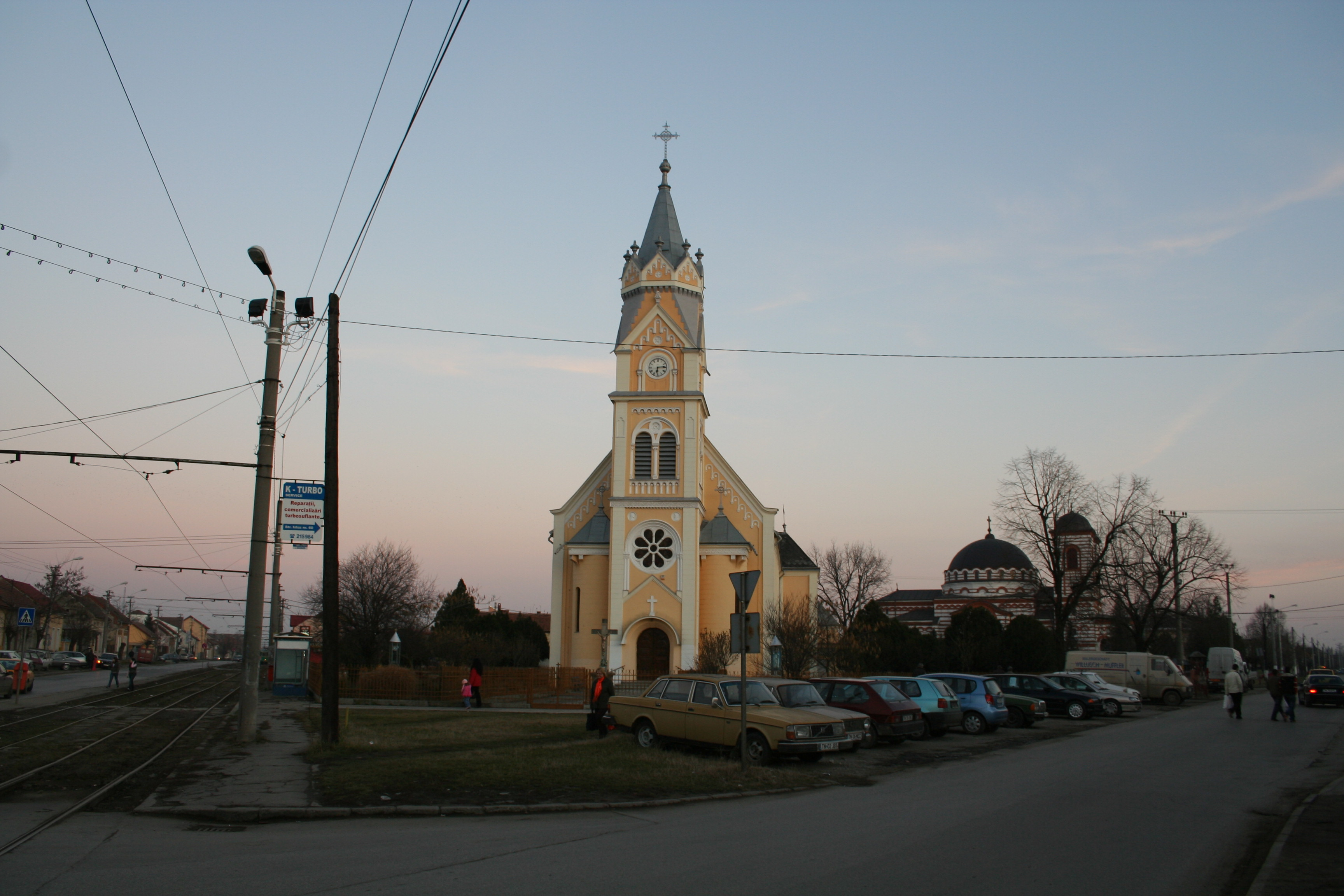 Biserica romano-catolica din cartierul Fratelia, Timisoara